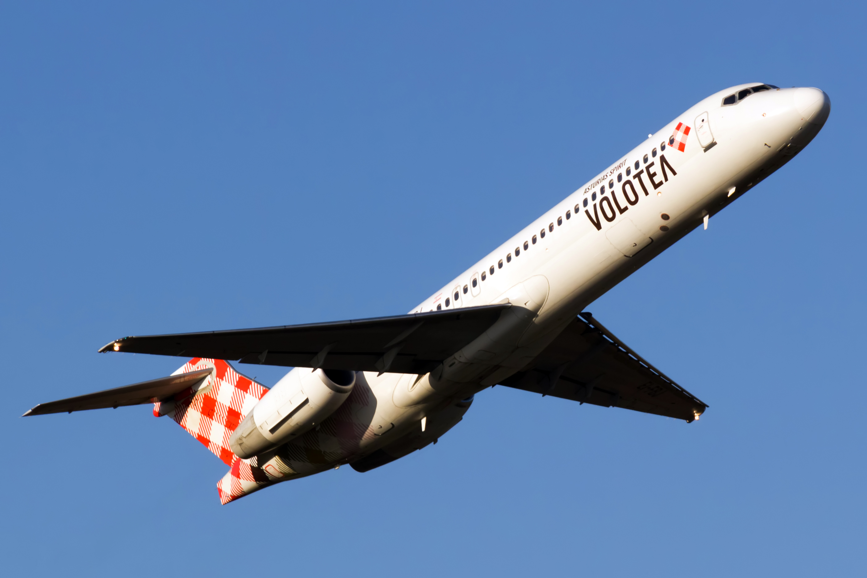 Boeing 717 de Volotea despegando do aeroporto de Vigo.